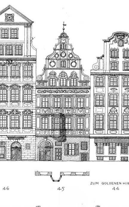 Fasada kamienicy nr 45 na wrocławskim Rynku. Grafika jest rekonstrukcją kamienic z 1800 roku, autorstwa Rudolfa Steina